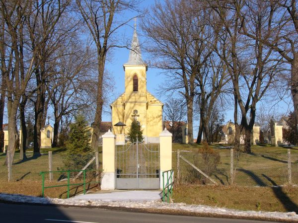 Érsekvadkerti kálvária és kápolna